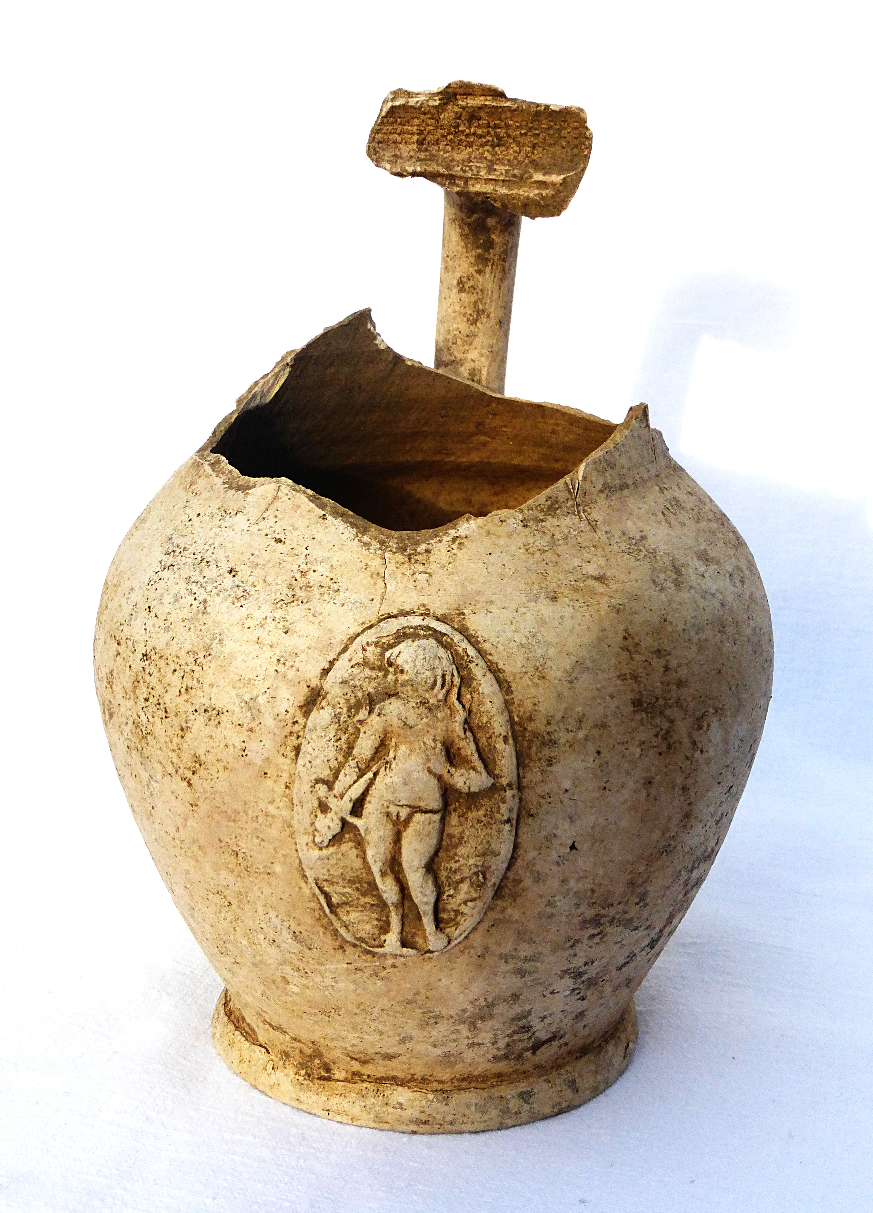 Tonkrüglein mit Lucretia aus Gschaid